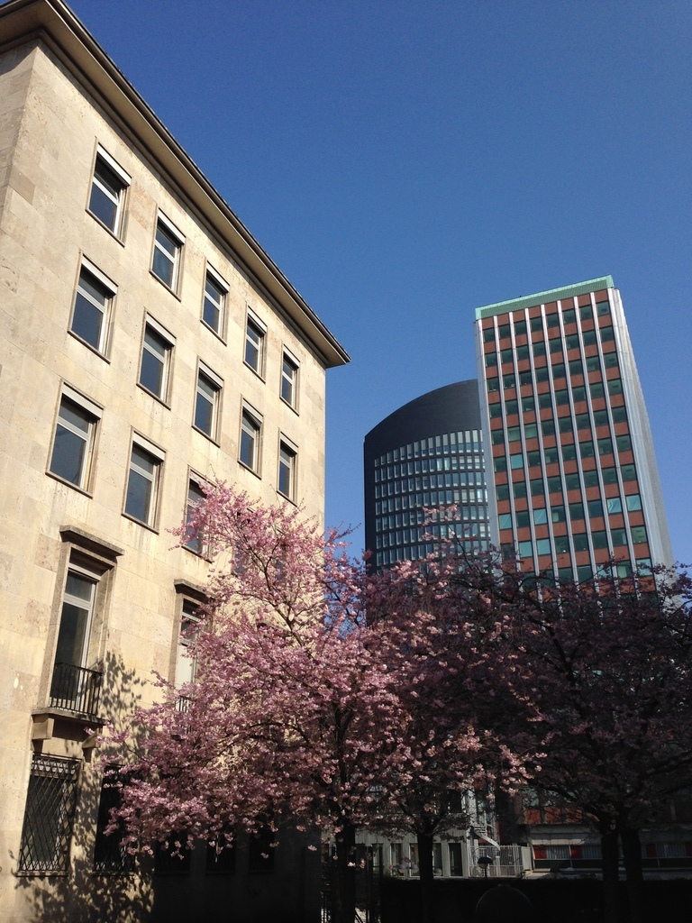 Dortberghaus und Skyline DortmundThis is a photograph of an architectural monument., no. 0906